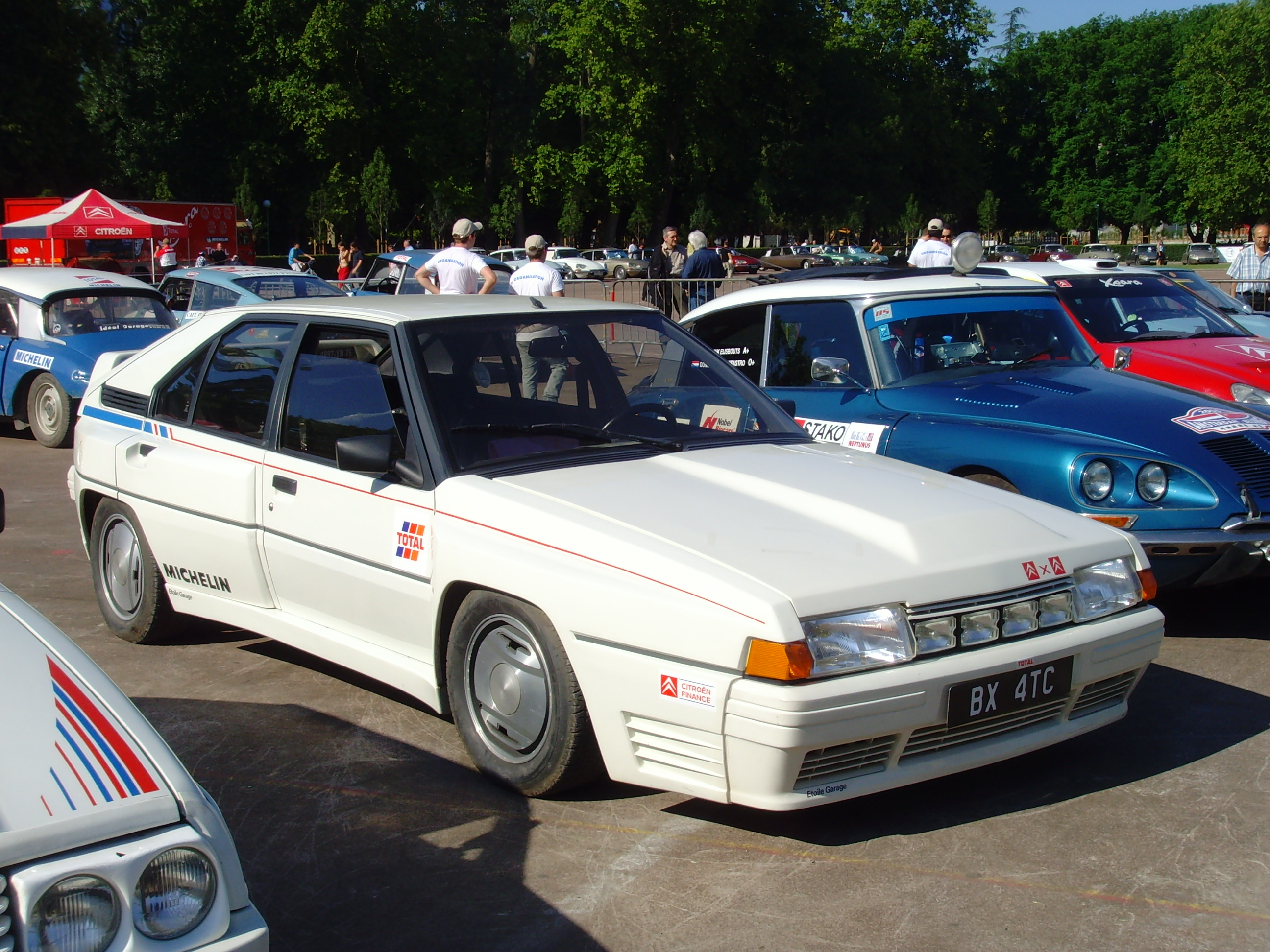 Citroën BX 4TC à Grenoble au Citroen Sport Classique en 2007